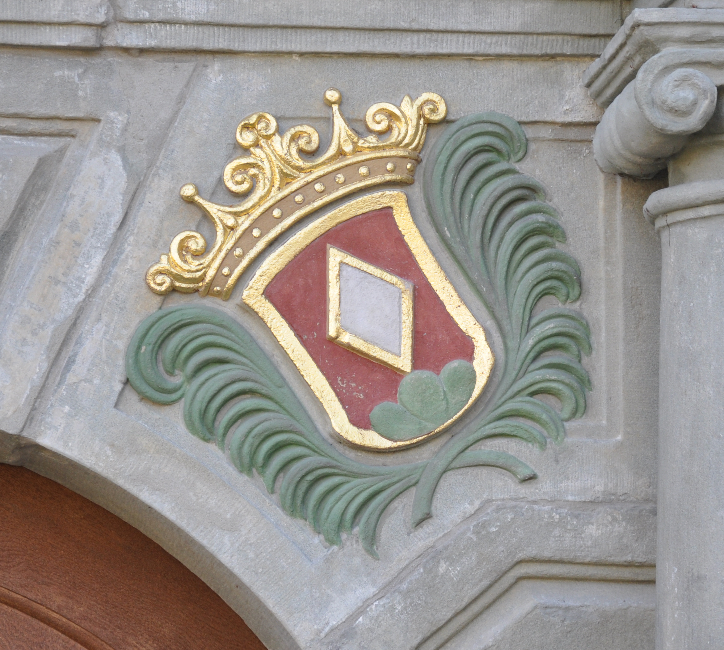 Wald (Landkreis Sigmaringen), Klosterkirche St. Bernhard, Portal, Wappen rechts: Wappen des Stifters Burkhard von Weckenstein